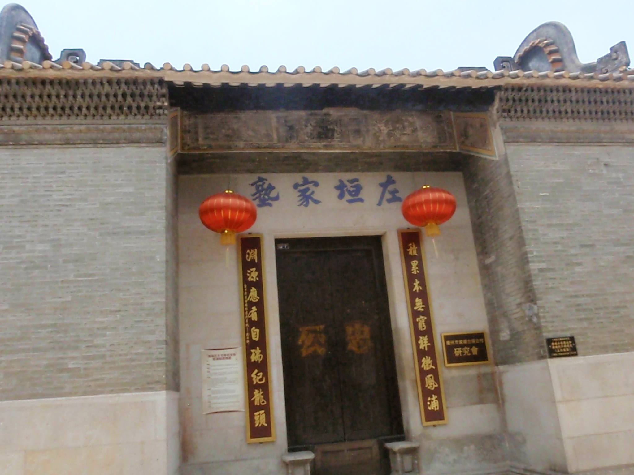 粵語: 梁經國 左垣家塾